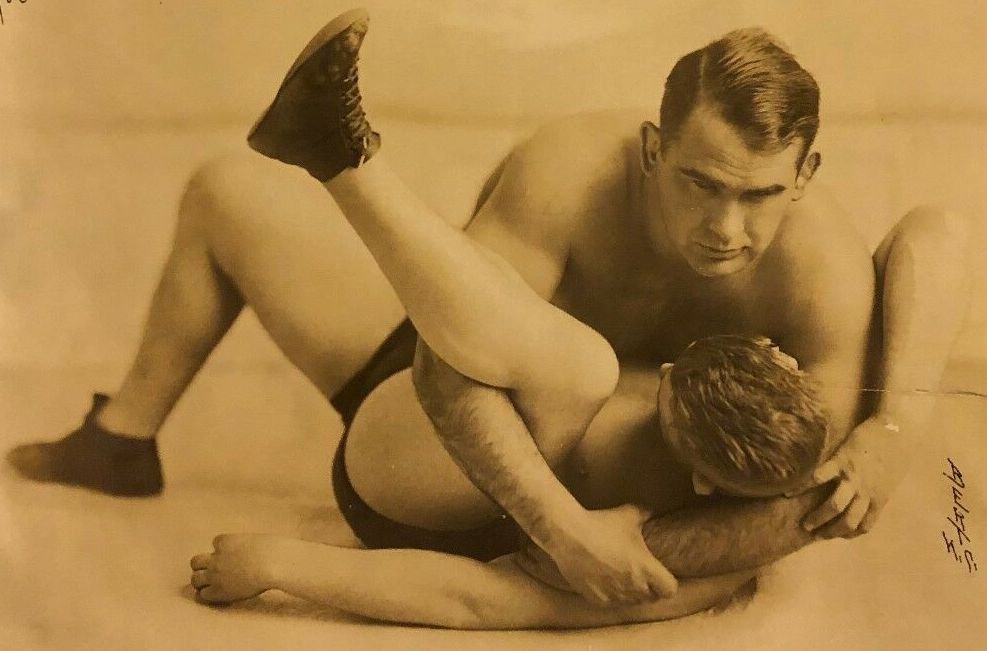 Photo de Ed (Strangler) Lewis de 1929 dédicacée.